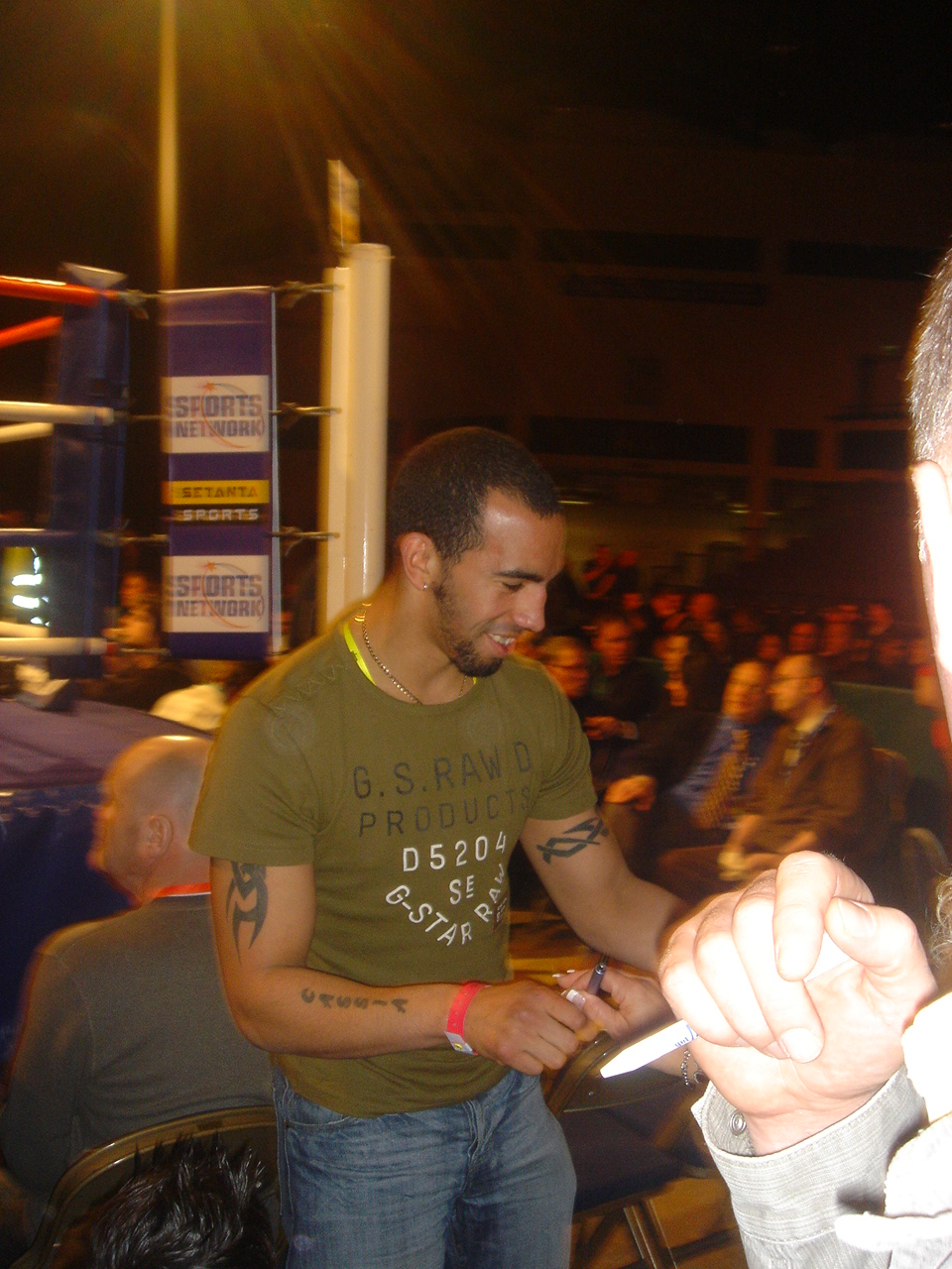 Bradley Pryce